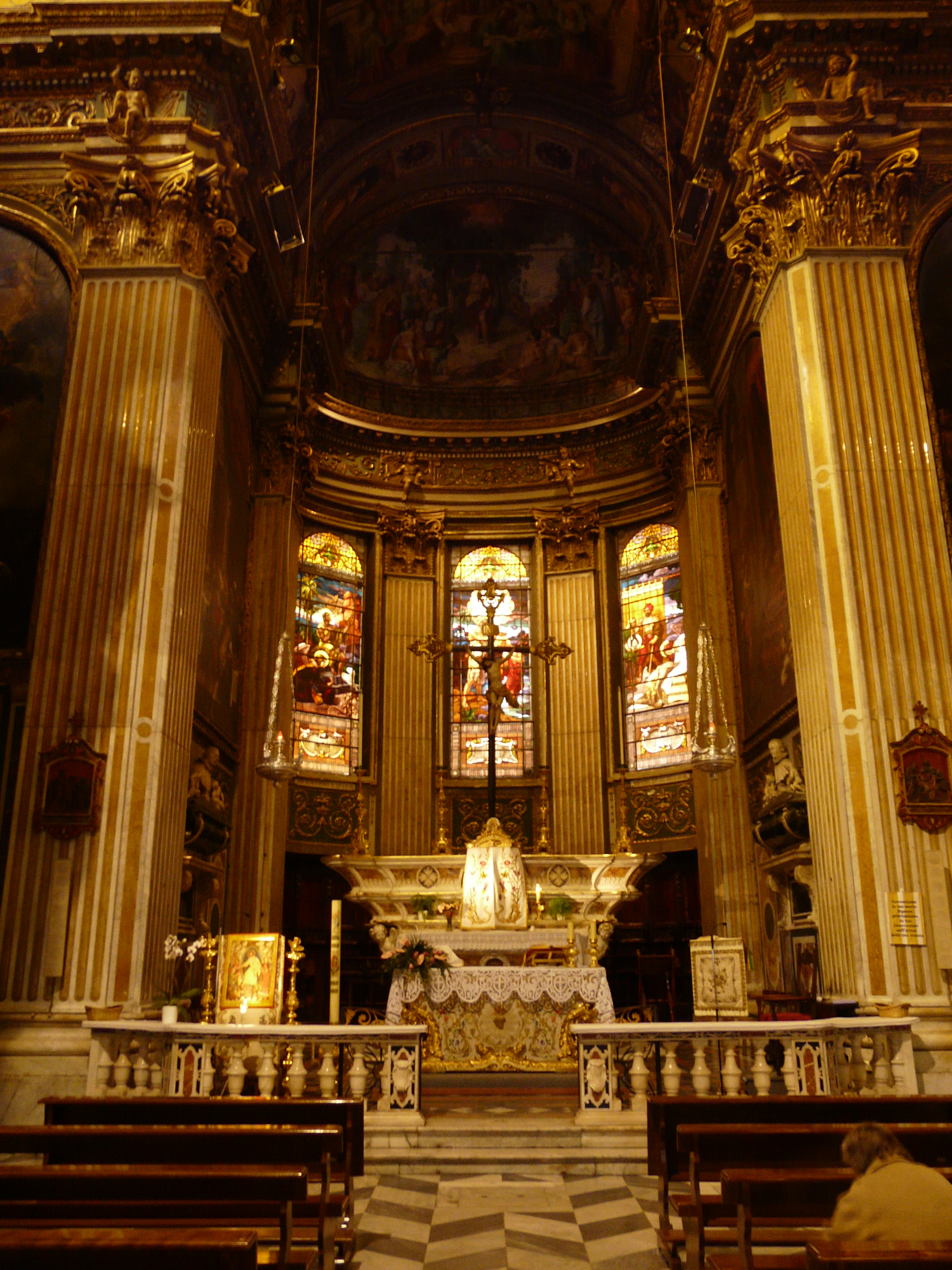 Altare maggiore della chiesa di San Giovanni Battista, Chiavari, Liguria, Italia